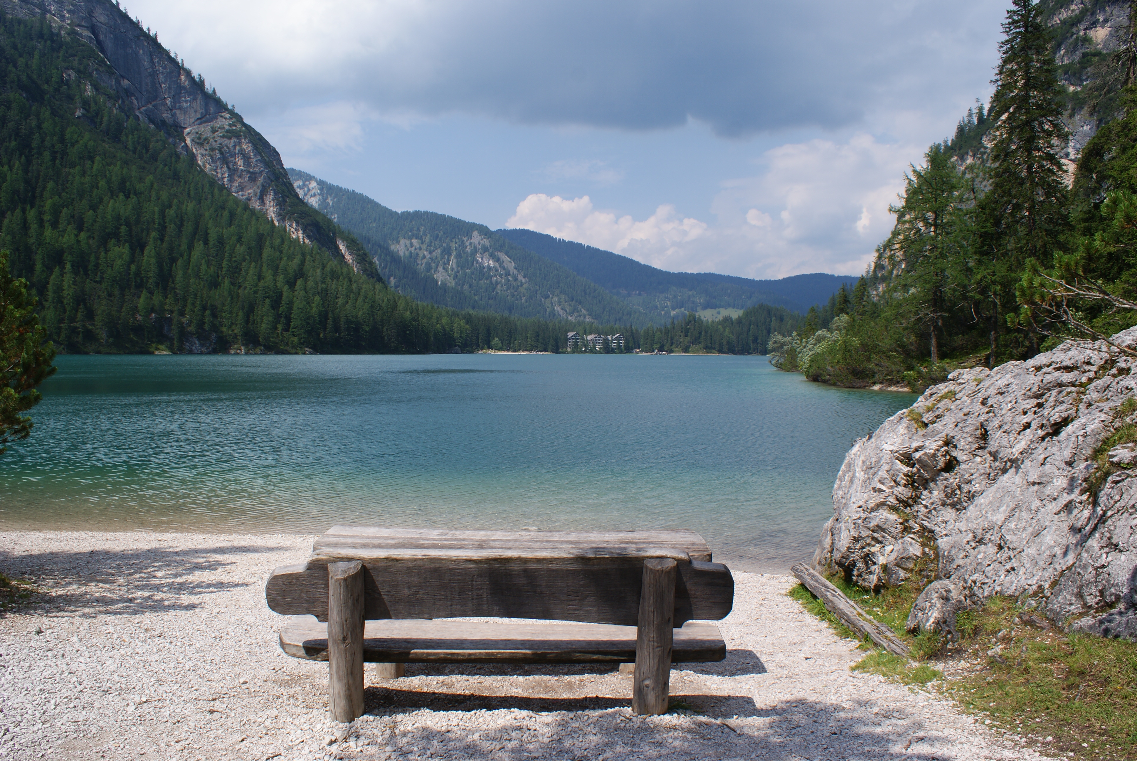 Lago di Braies in Val Pusteria